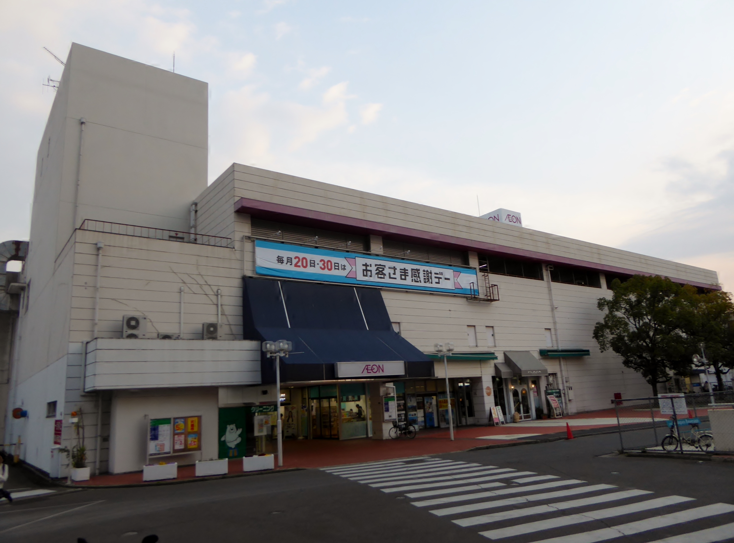 イオン富雄店を撮影。